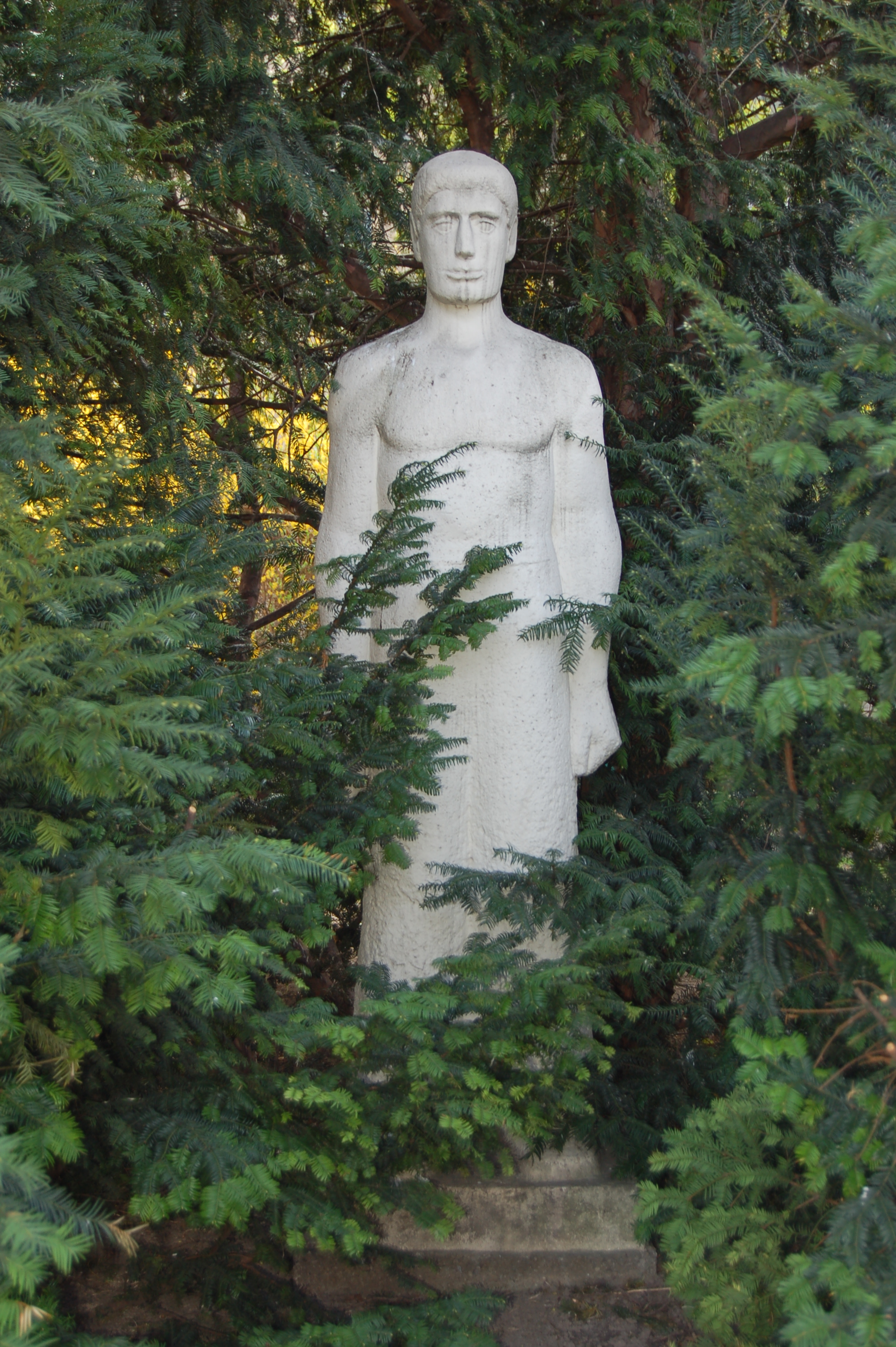 Die Figur Natursteinplastik im Franz-Novy-Hof in Wien Ottakring (vor Pfenninggeldgasse 4-4A, Stiege 3).